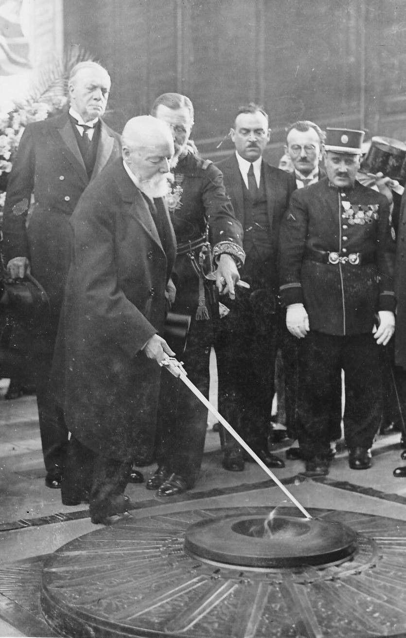 Paul Doumer ranimant la flamme éternelle sur la tombe du Soldat inconnu (Paris).